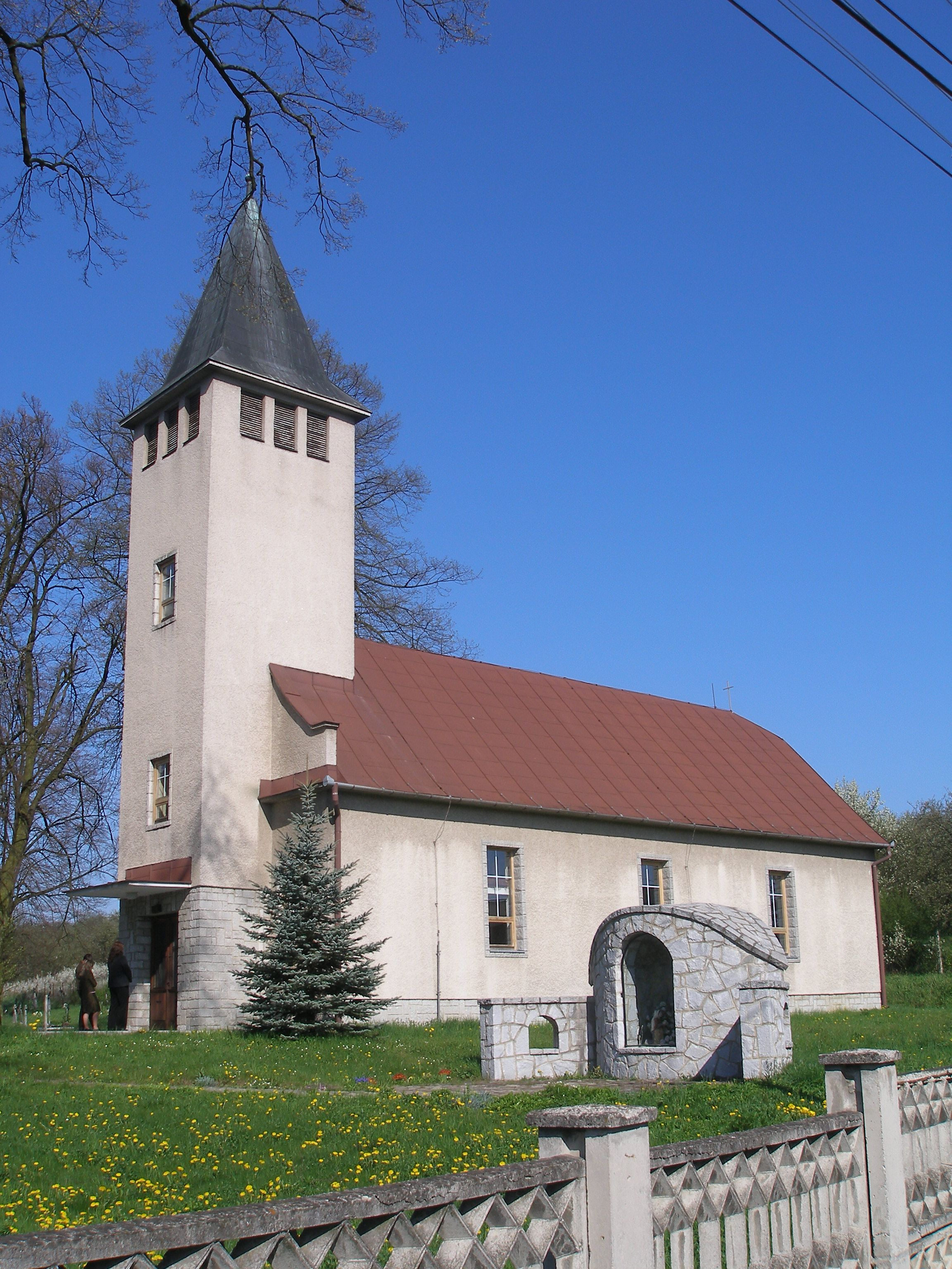 Obec Nemcovce okres Prešov región Šariš